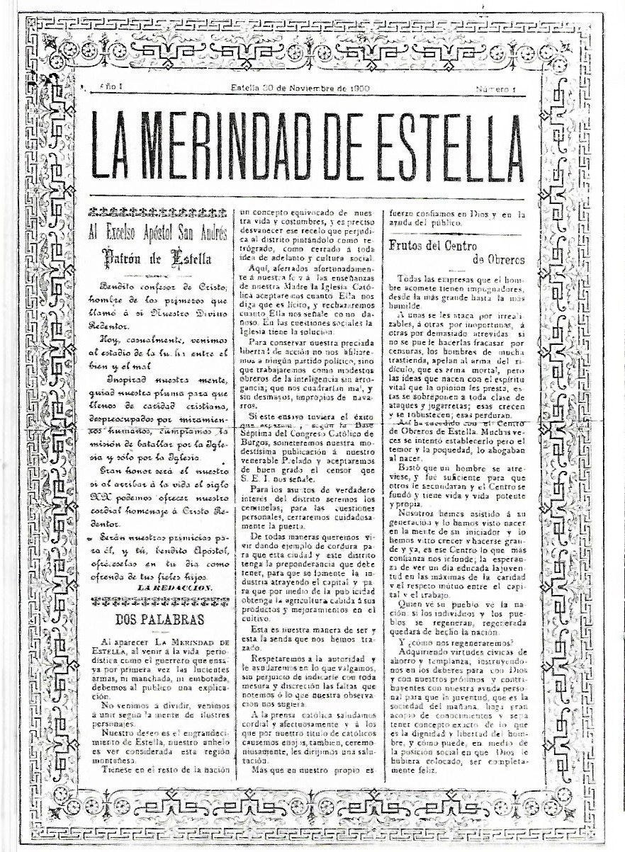 Estella. La Merindad de Estella. 1905. Periódico